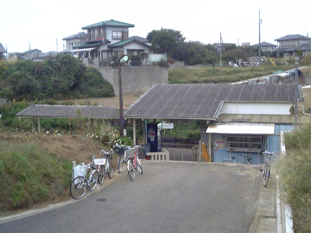 殿山駅(2009/10/24撮影)